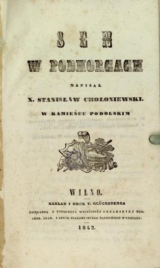 Strona tytułowa pierwszego wydania "snu w Podhorcach"